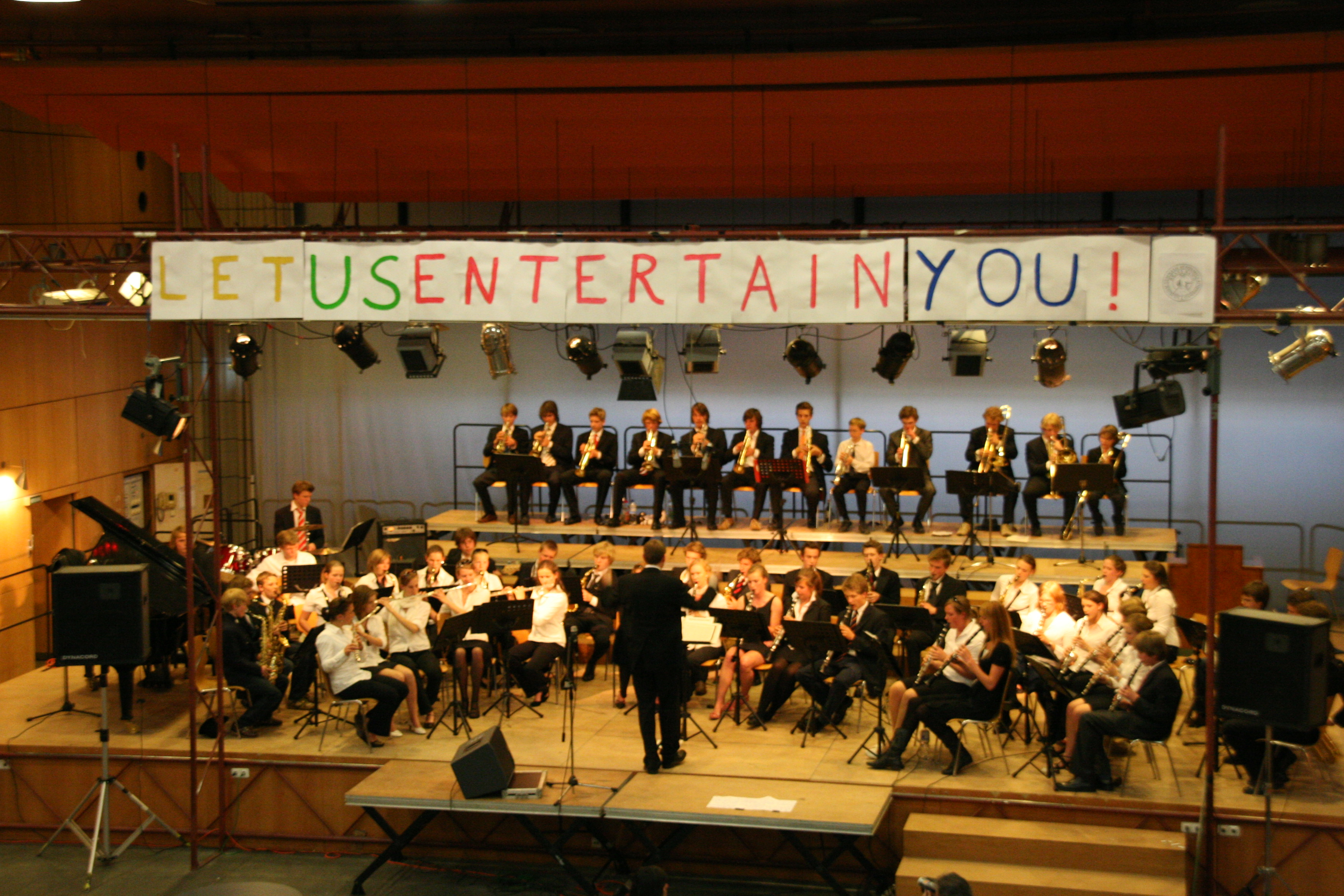 Die Brass Band des Christianeums, selbst fotographiert